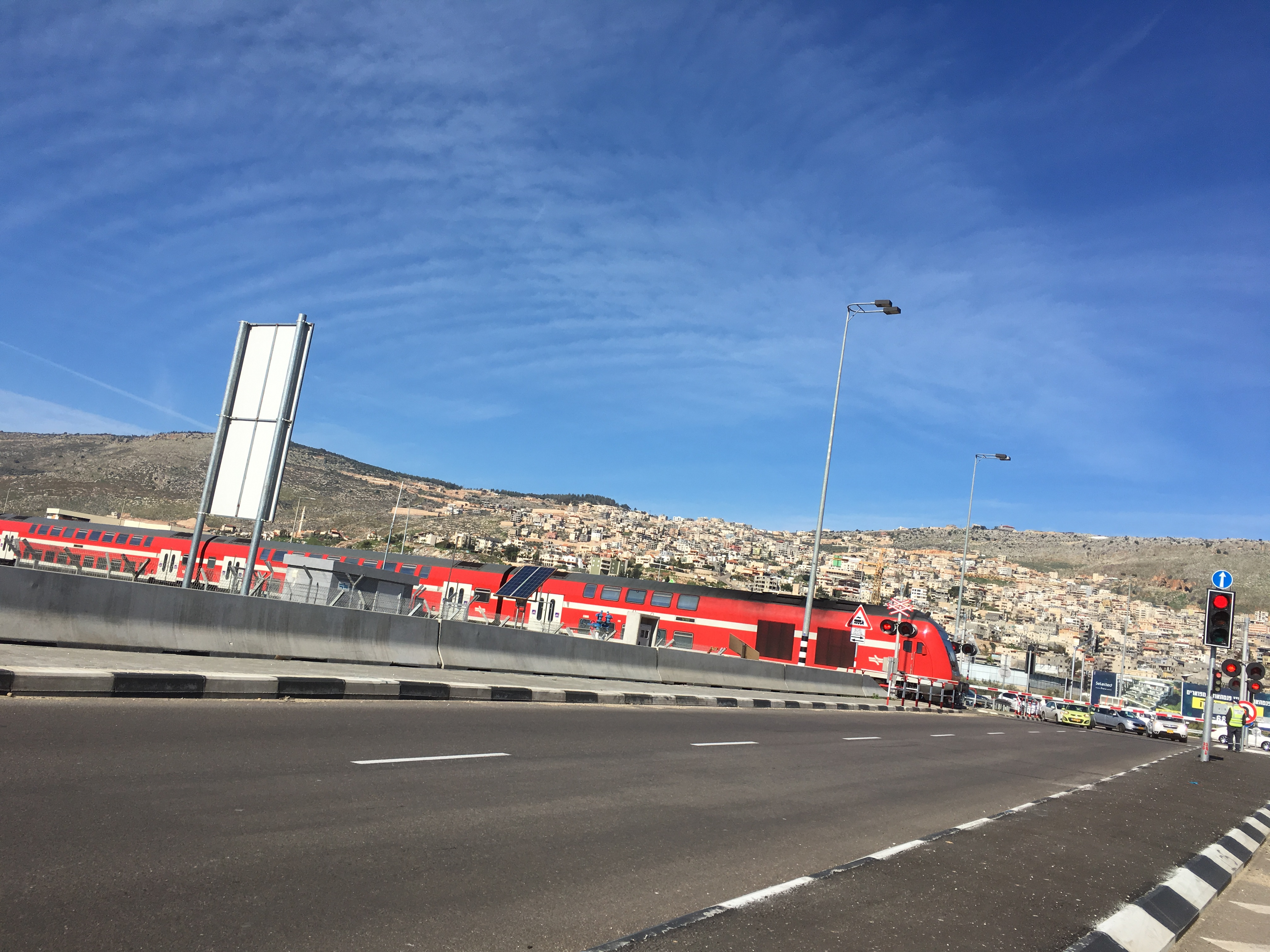 הרכבת לכרמיאל מגיעה מכיוון מערב מהקריות לעכו במחסום החיבור בין כביש 784 וכביש 85